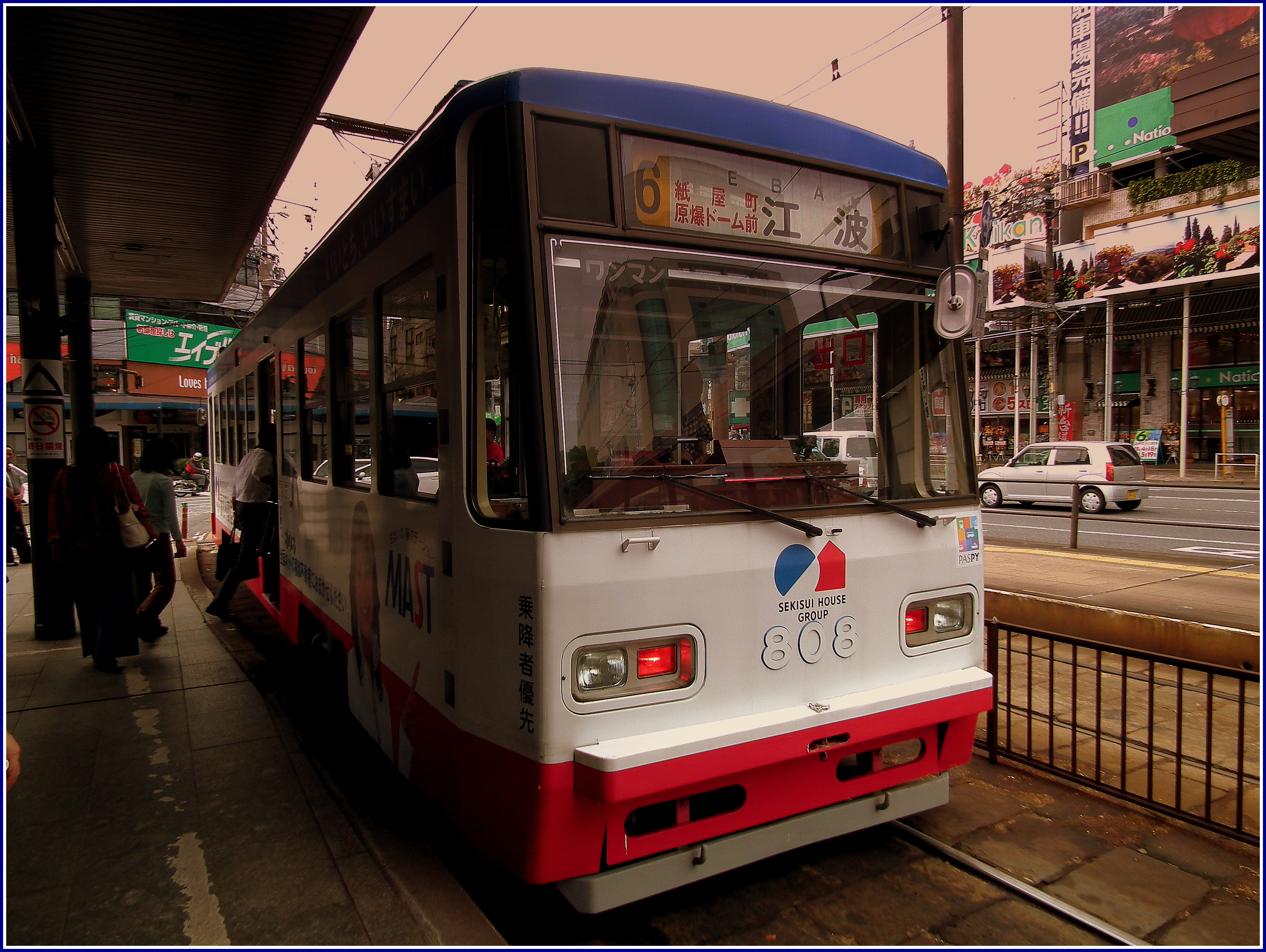 HIROSHIMA STREETCAR AT HIROSHIMA STATION JAPAN JUNE 2012